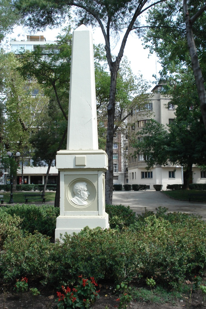 Obelisco dedicado a Fray Camilo Henríquez, Manuel de Salas, Manuel José Gandarillas y Manuel de Salas, ubicado en el Parque Forestal de la ciudad de Santiago de Chile.